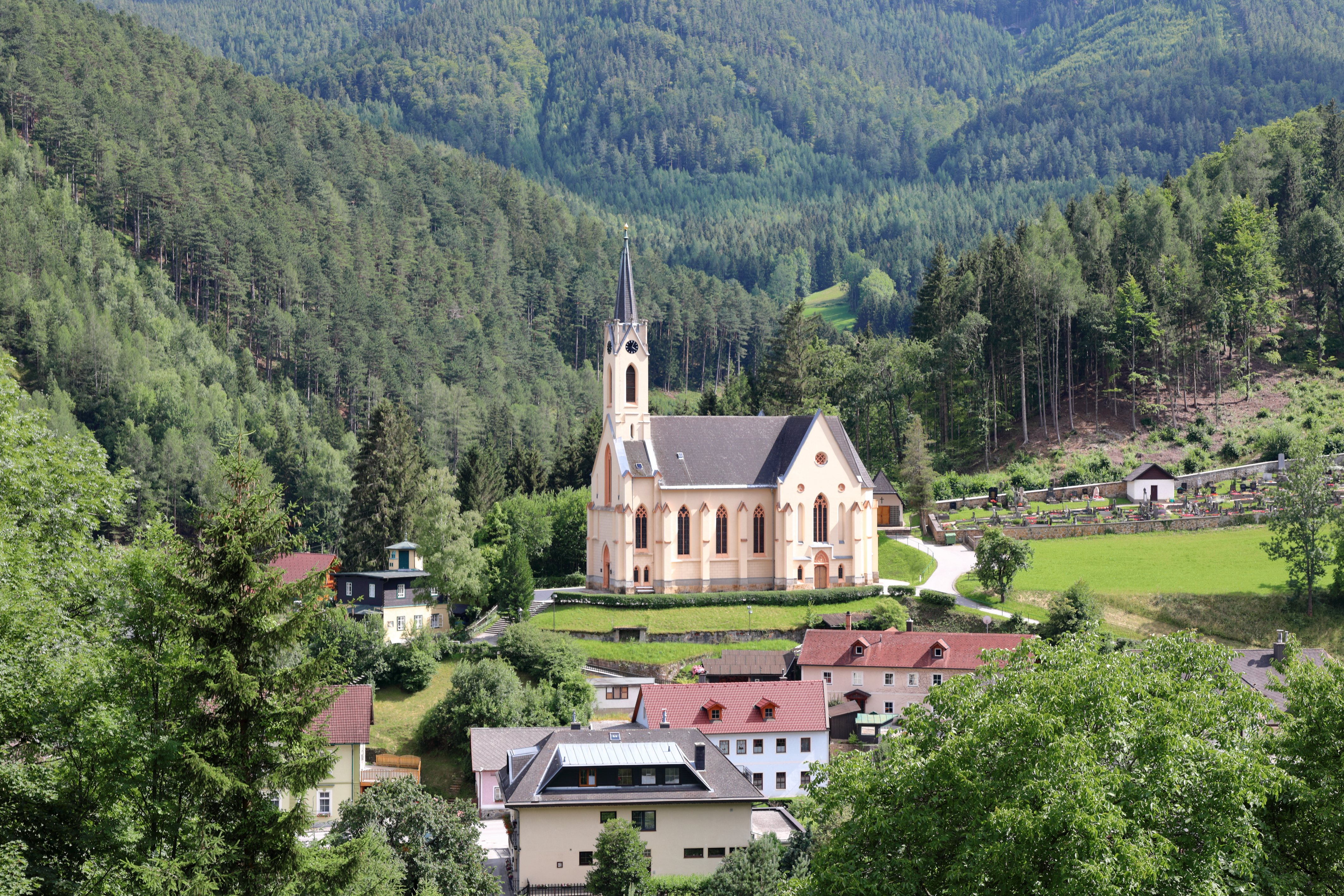 Blick von Norden über Prein an der Rax, ein Dorf in der niederösterreichischen Marktgemeinde Reichenau an der Rax, auf die röm.-kath. Pfarrkirche Pauli Bekehrung.